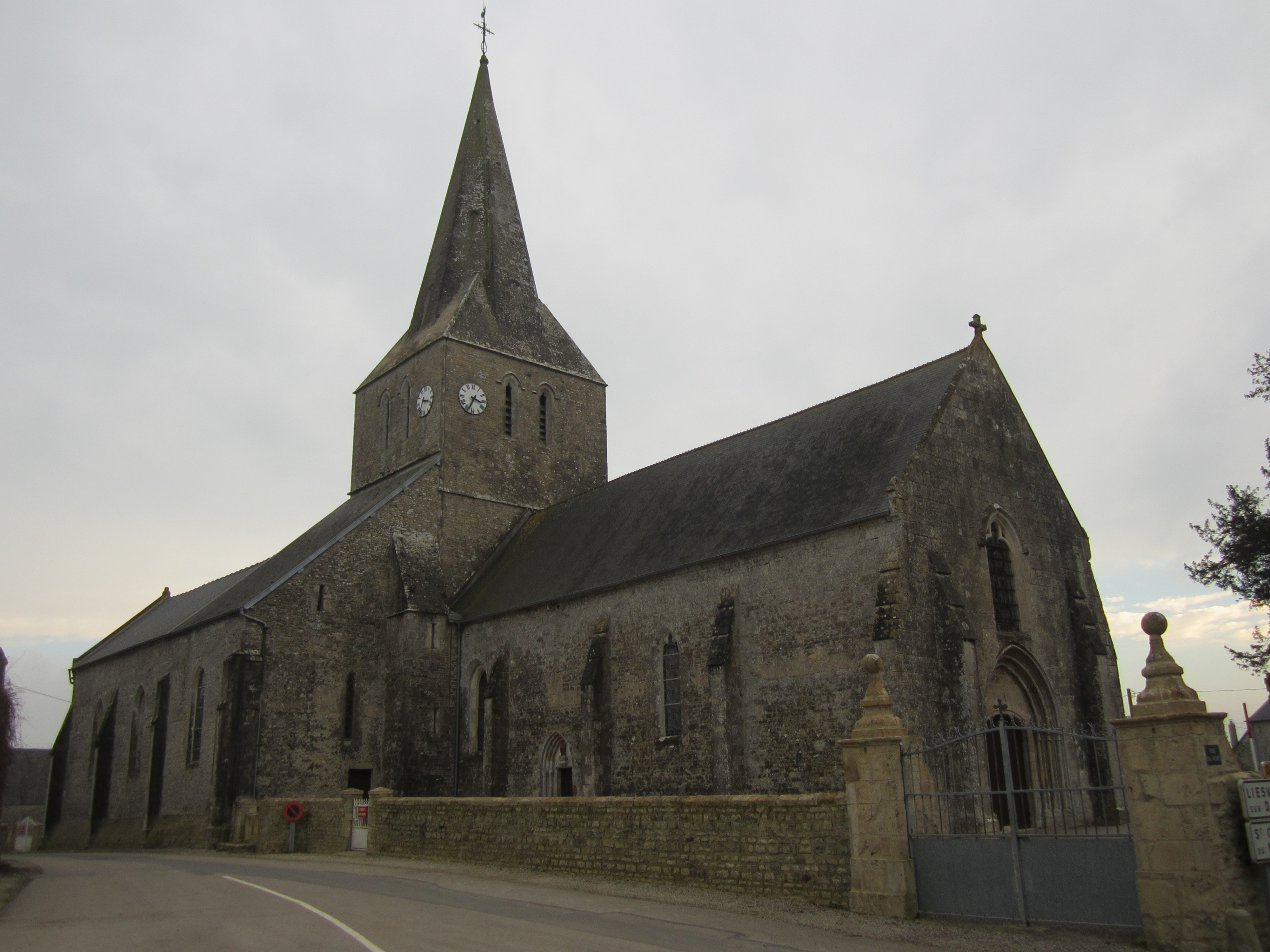 Carquebut, France